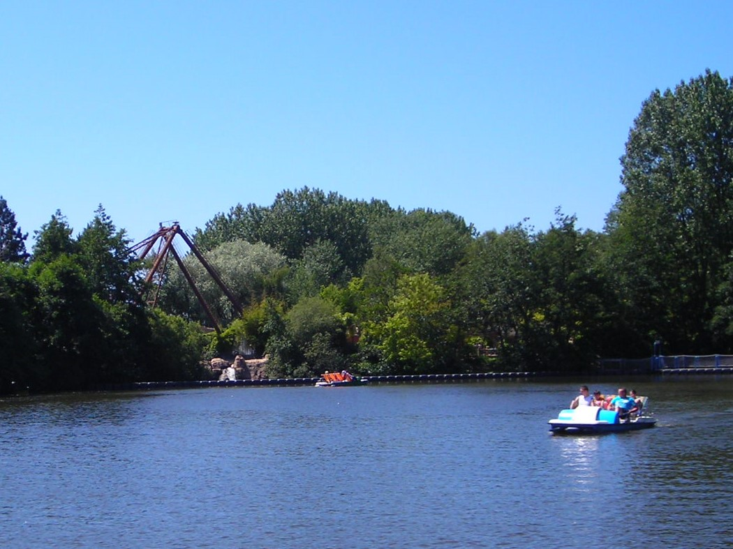 Cap'tain Bag Bateaux à pédales 2011 Bagatelle